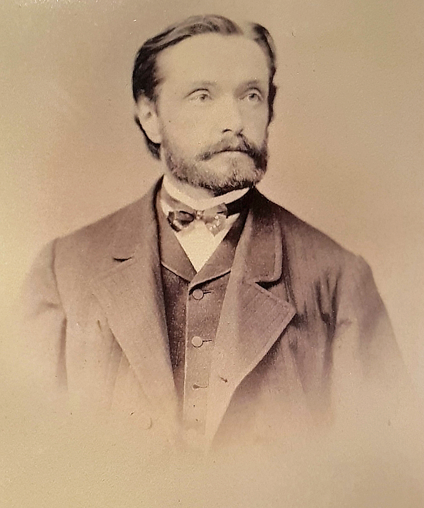 Karl Remeis, Foto Karl Remeis Sternwarte, Bamberg